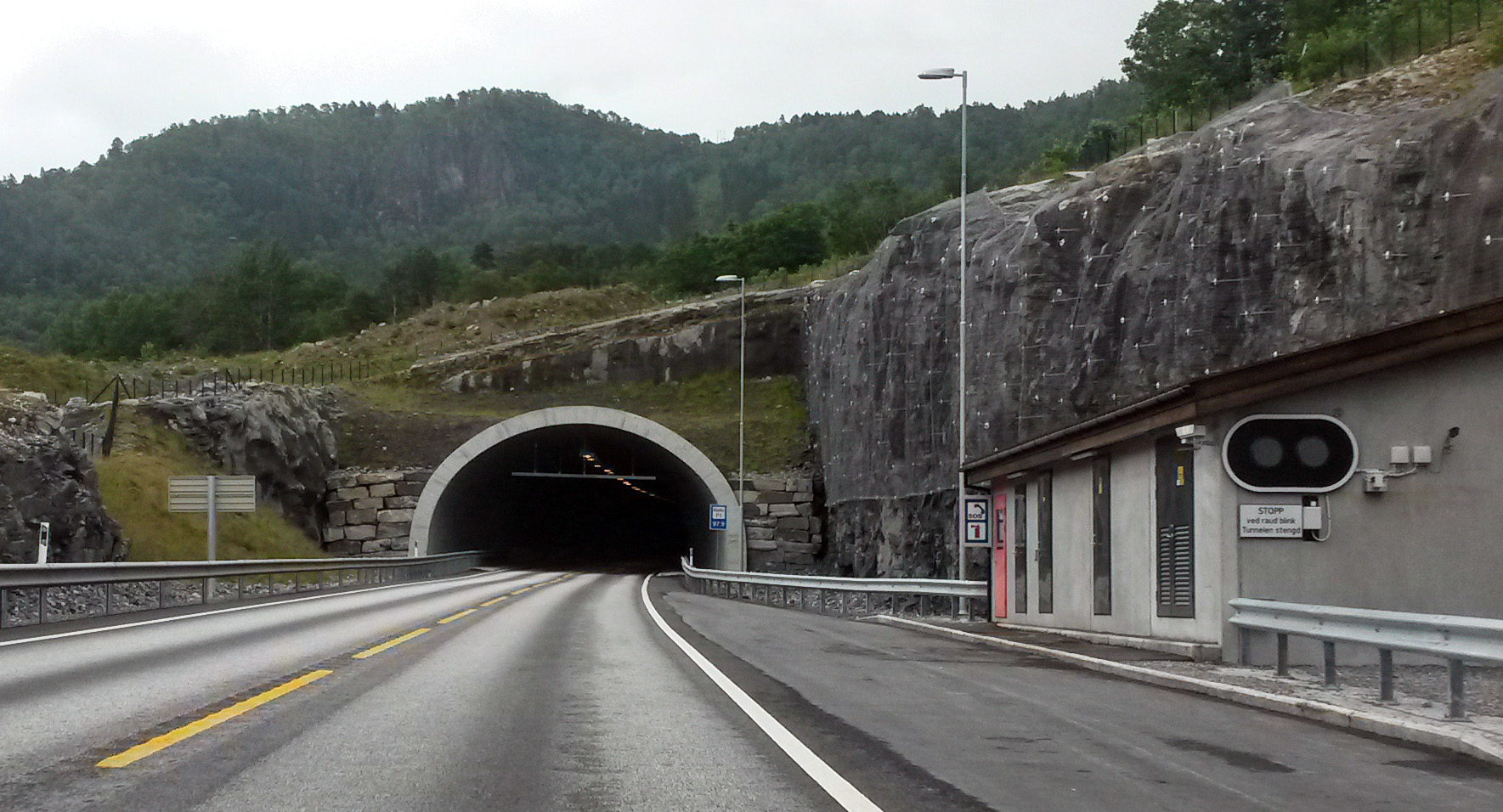 Vågstrandtunnelen på E136